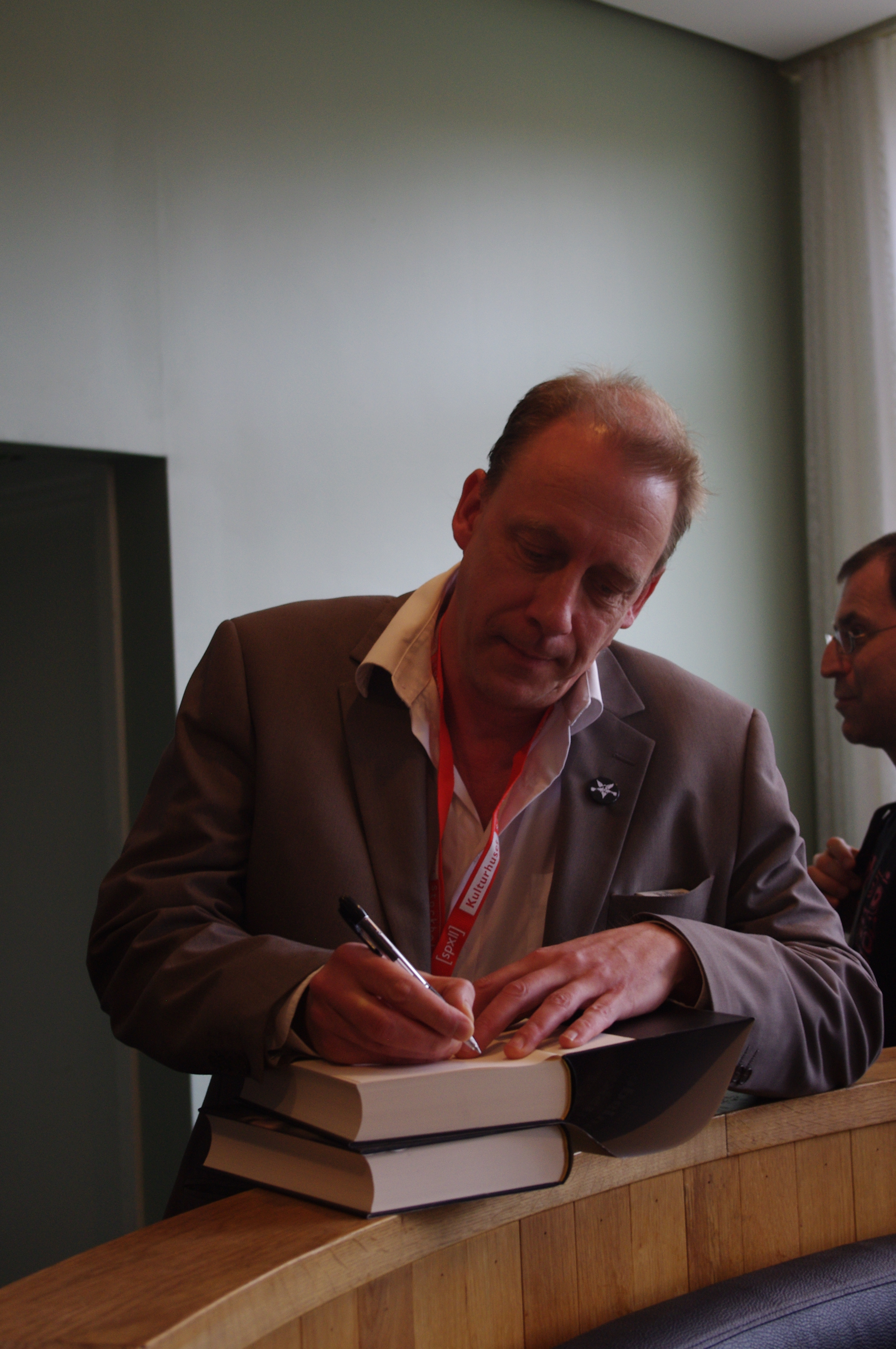 Skräckförfattaren Anders Fager signerar på Eurocon 2011.